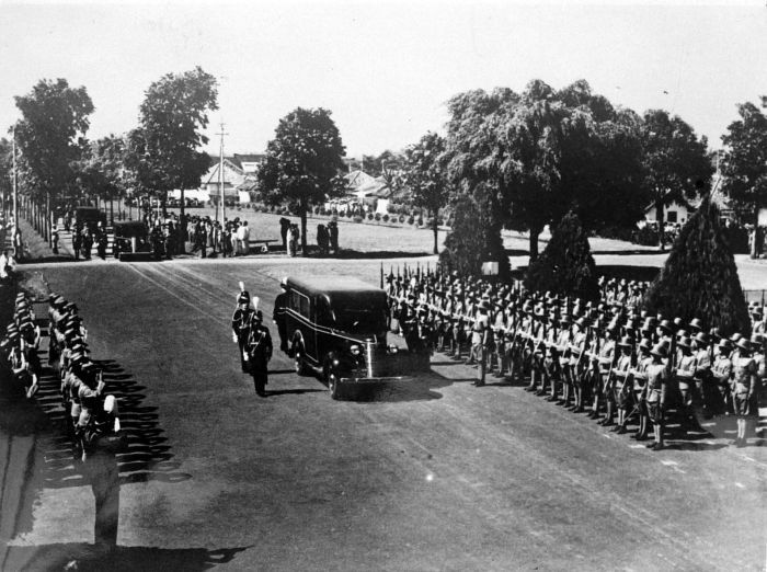 Repronegatief. Begrafenis van generaal Berenschot op het Pandoe-kerkhof te Bandung